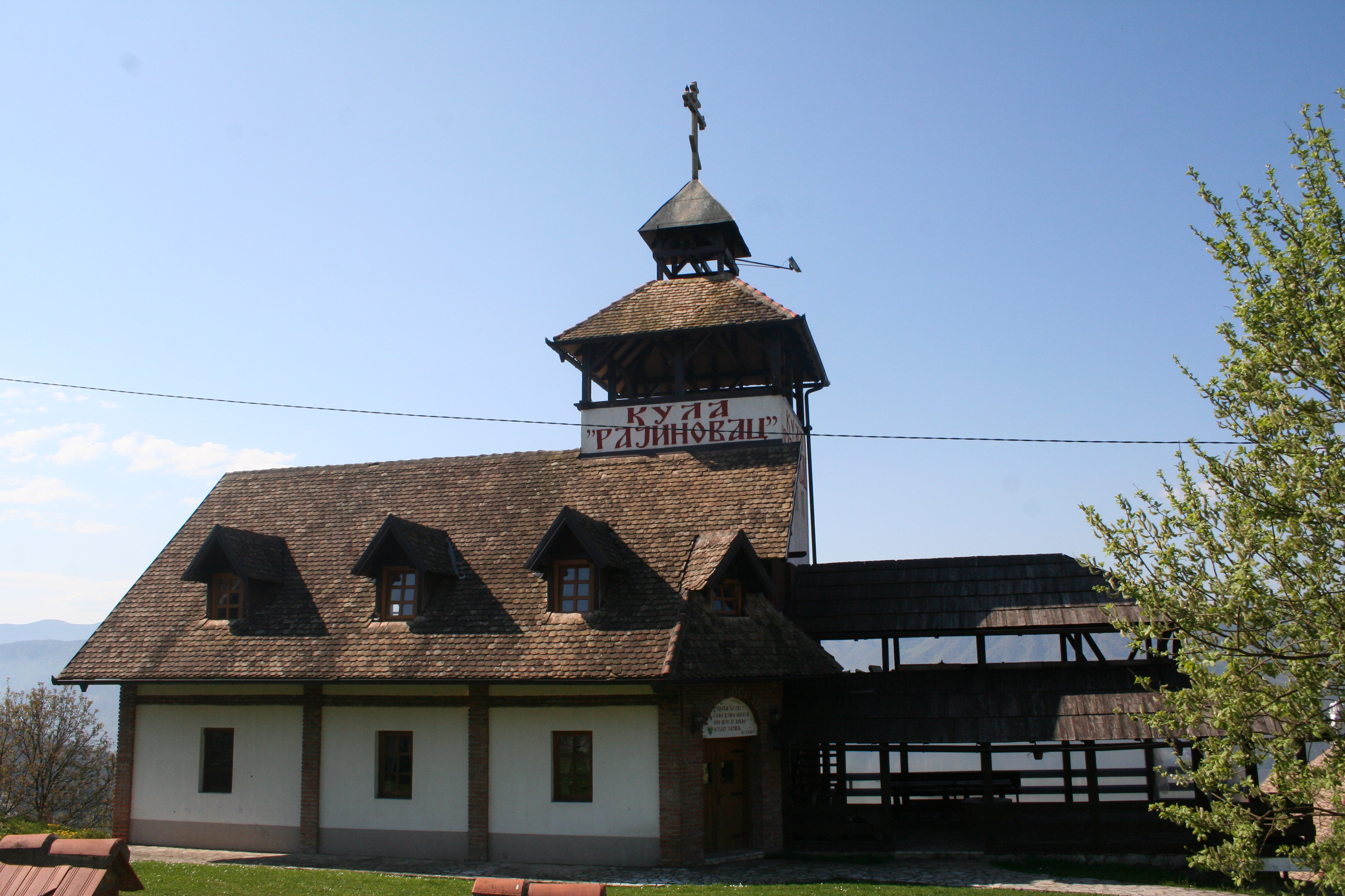 Etno kompleks Ognjište, Bjele vode